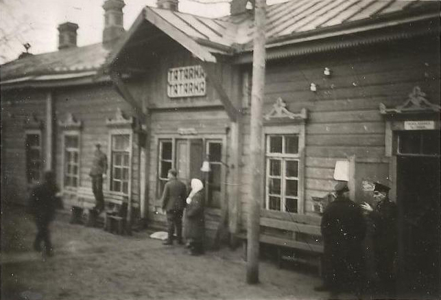 Беларуская (тарашкевіца): Татарка (Tatarka), вуліца Вакзальная (vulica Vakzalnaja). Чыгуначная станцыя